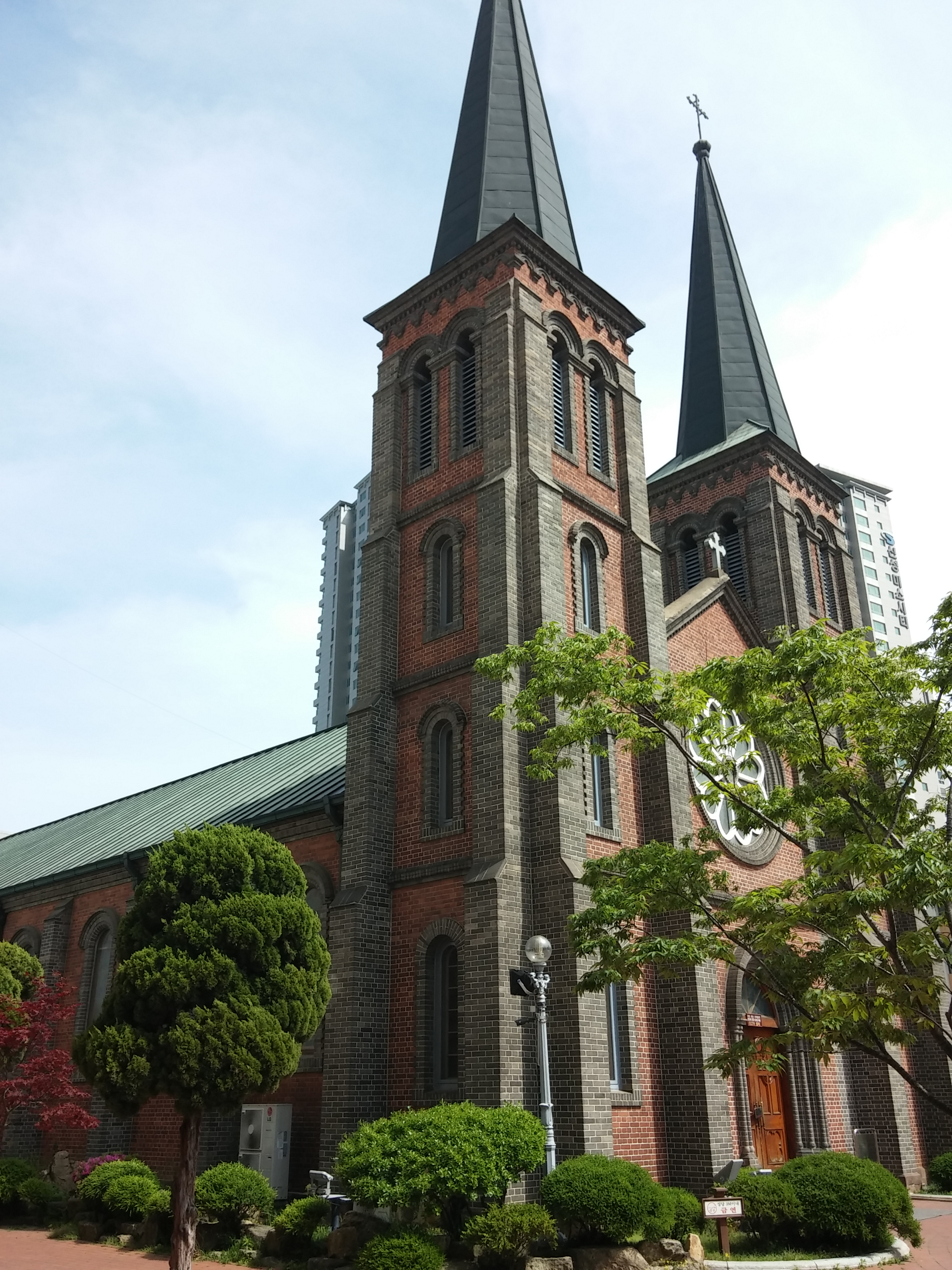 계산동성당